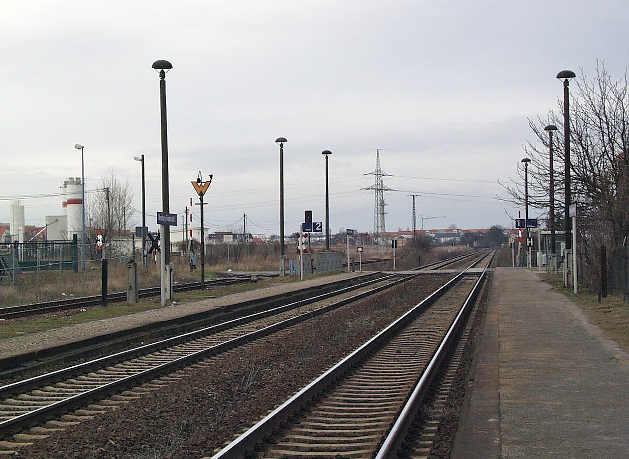 Haltepunkt Bernburg-Friedenshall an der Bahnstrecke Köthen-Aschersleben in Sachsen-Anhalt, Deutschland.